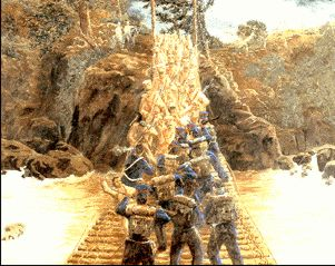 Combate del puente de Llaclla.